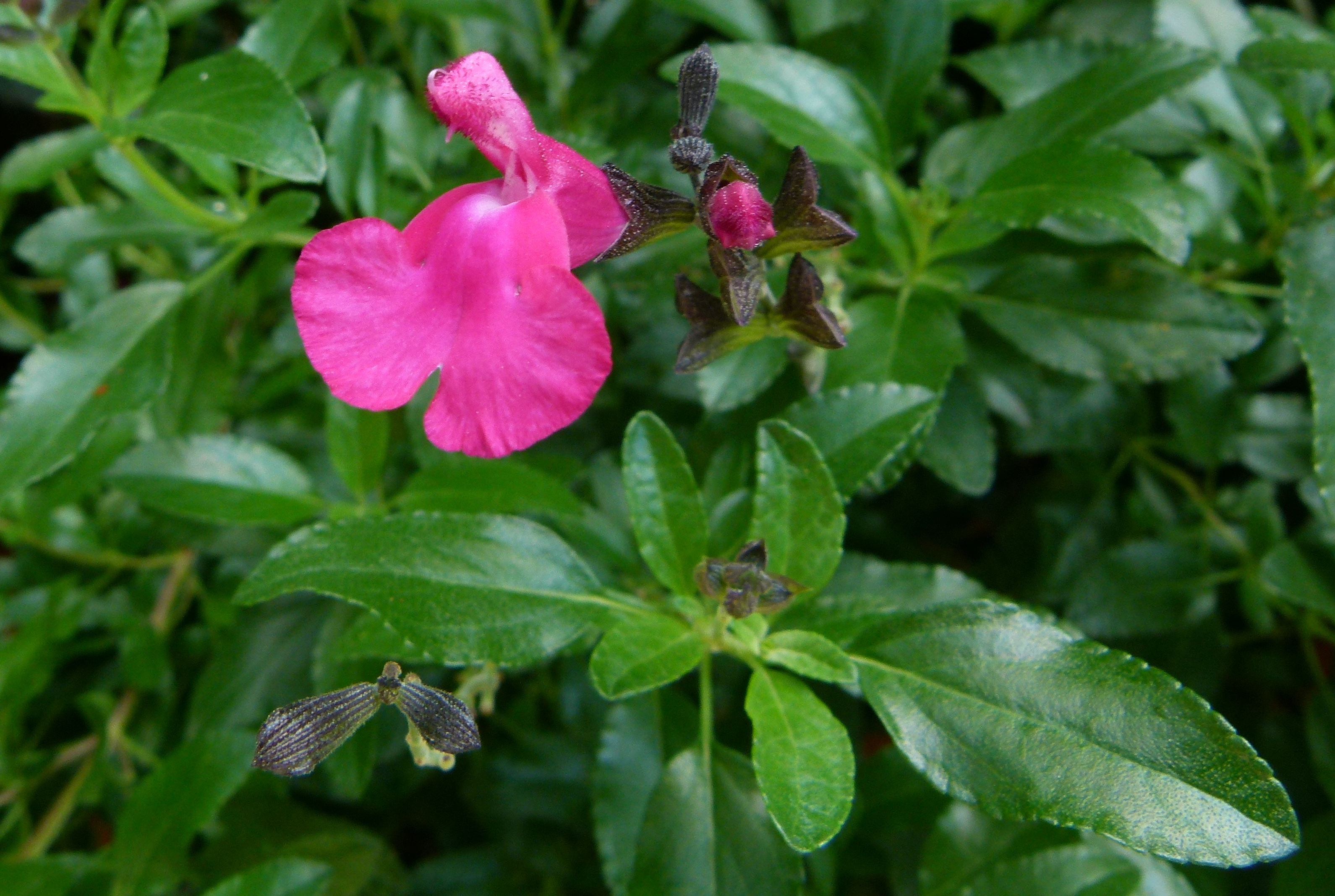 Salvia graham